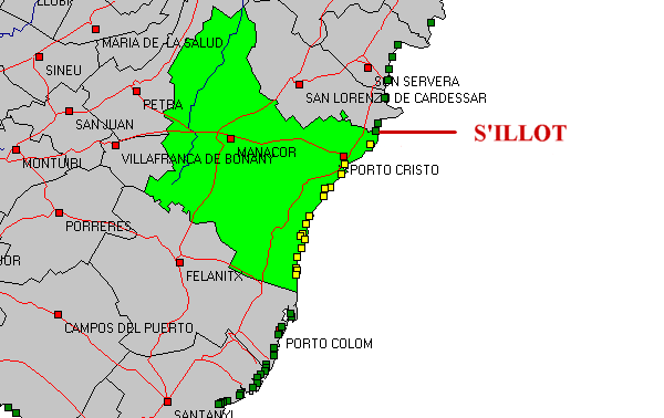 Skizze S'Illot